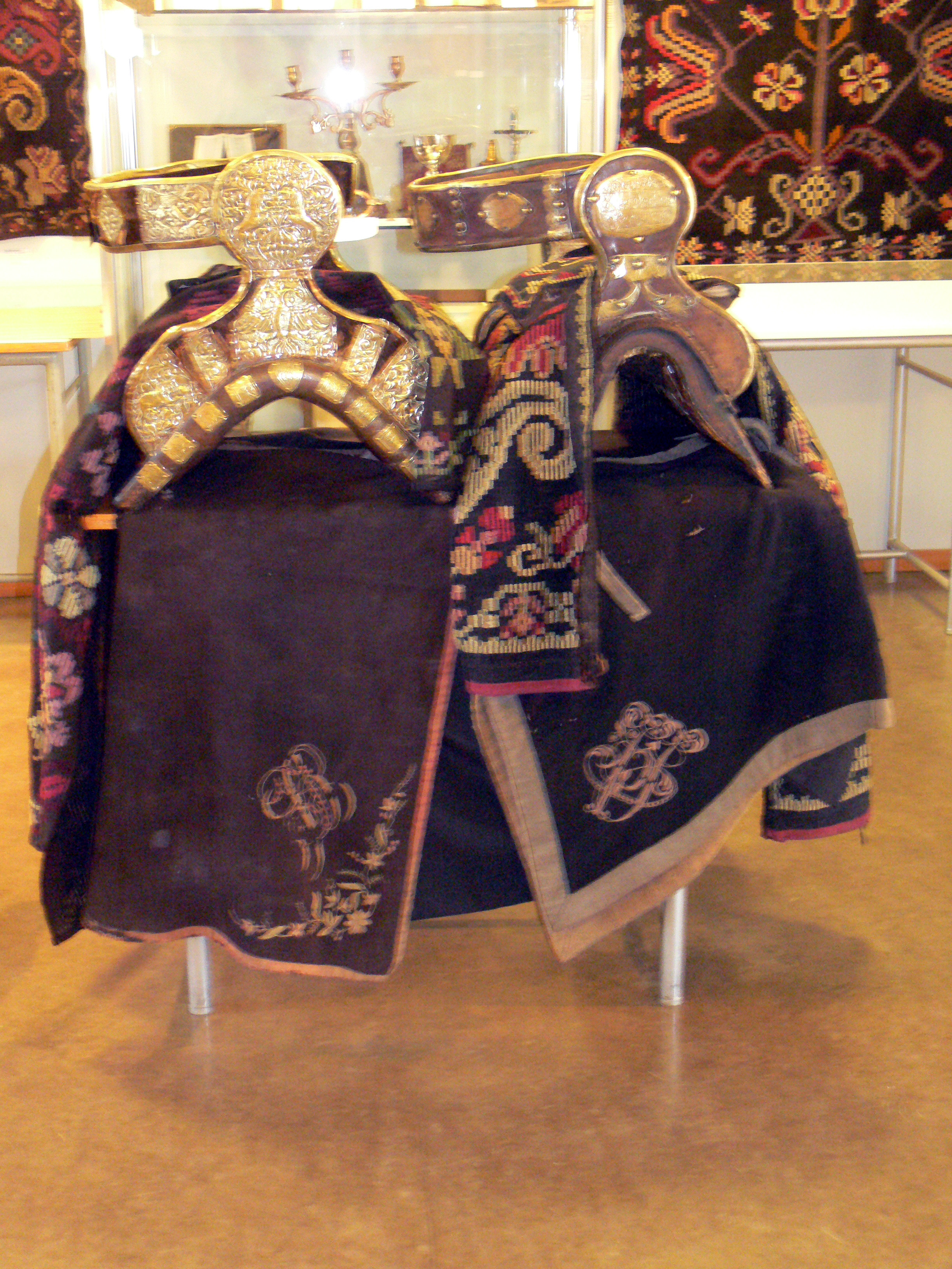 Damensättel im Museum von Skógar